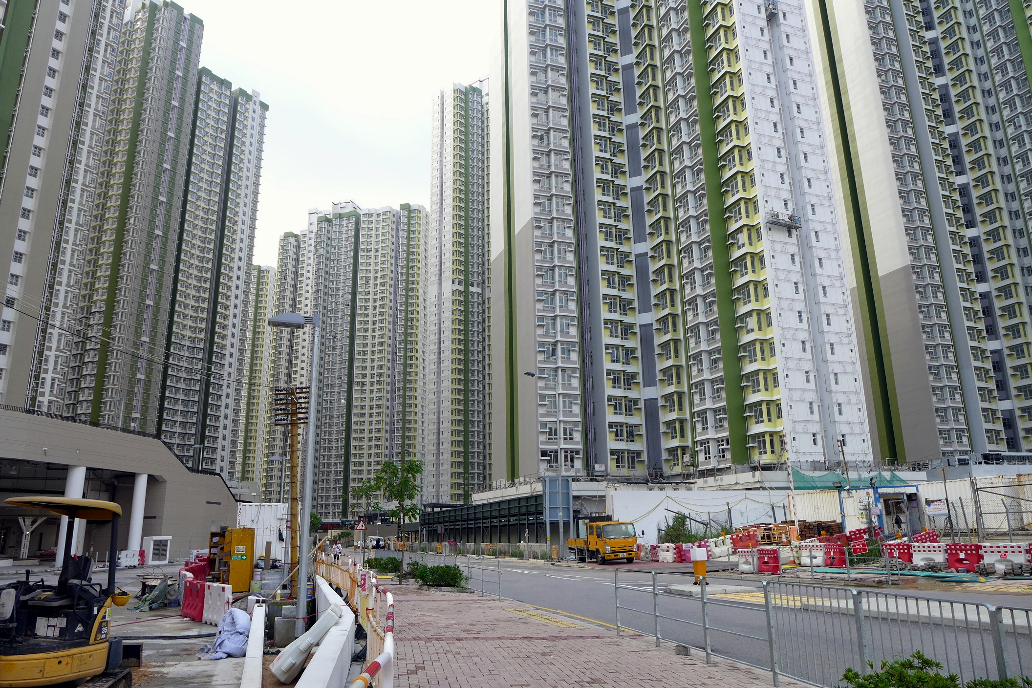 On Tat Estate